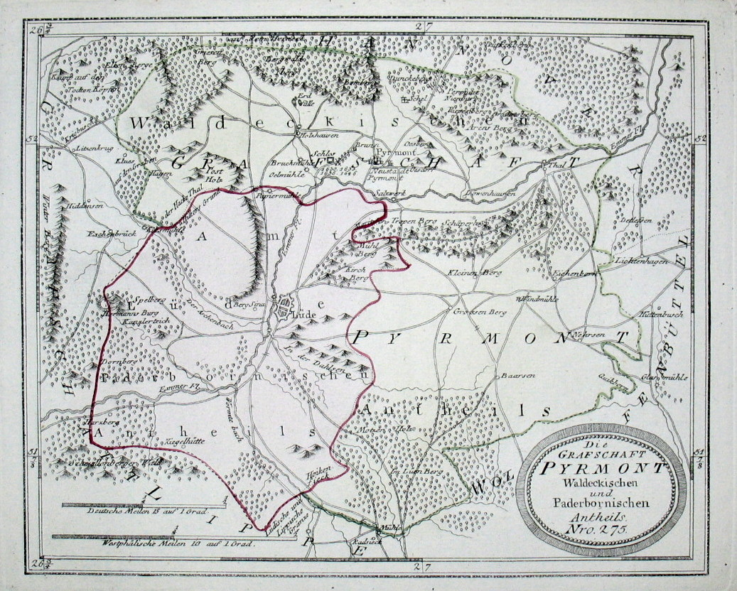 Die Grafschaft Pyrmont Waldeckischen und Paderbornischen Antheils. Nro. 275. Kolorierter Kupferstich